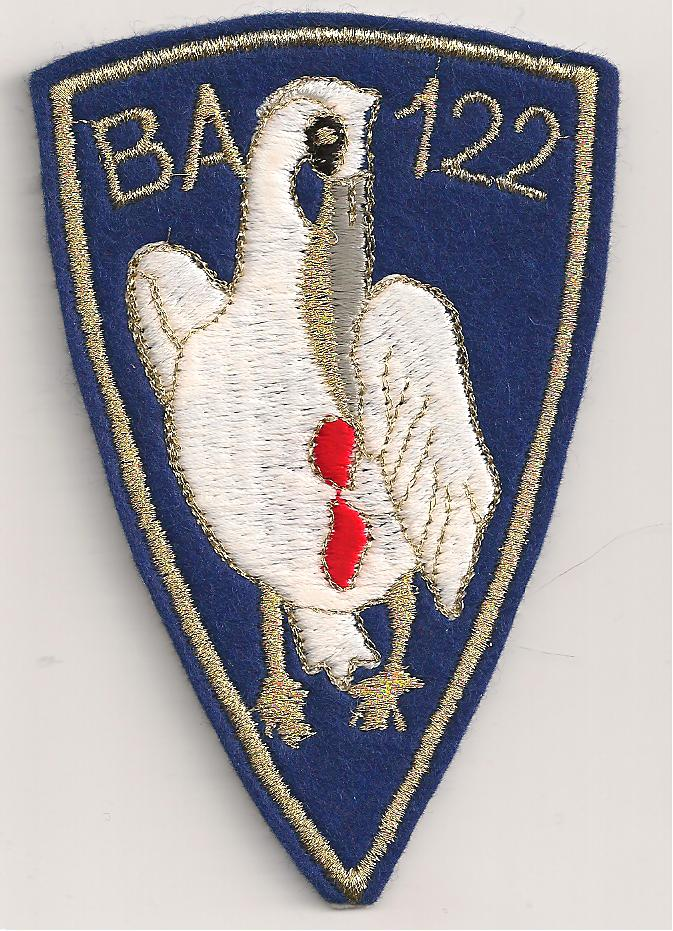 Insigne de manche de l'Escadron de Protection EP 41.122 Fusiliers-commandos de l'air Base aérienne 122 Chartres-Champhol 1987